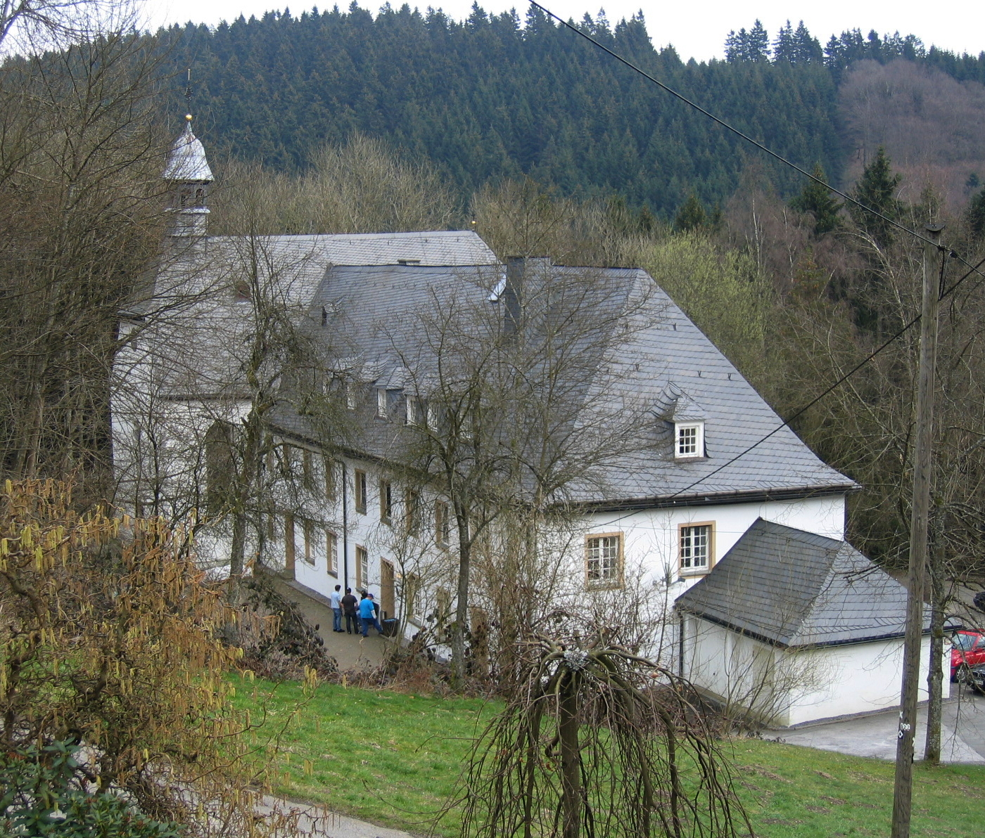 Kloster Brunnen (1721 Klosterausbau durch Kapuzinermönche) mit Wallfahrtskirche St. Antonius von Padua (angebaut 1742 bis 1744) in der Nähe von Brenschede im Ortsteil Sundern-Endorf. Seit 1975 Nutzung durch das Diözesanzentrum der "Katholischen Jungen Gemeinde" im Erzbistum Paderborn.